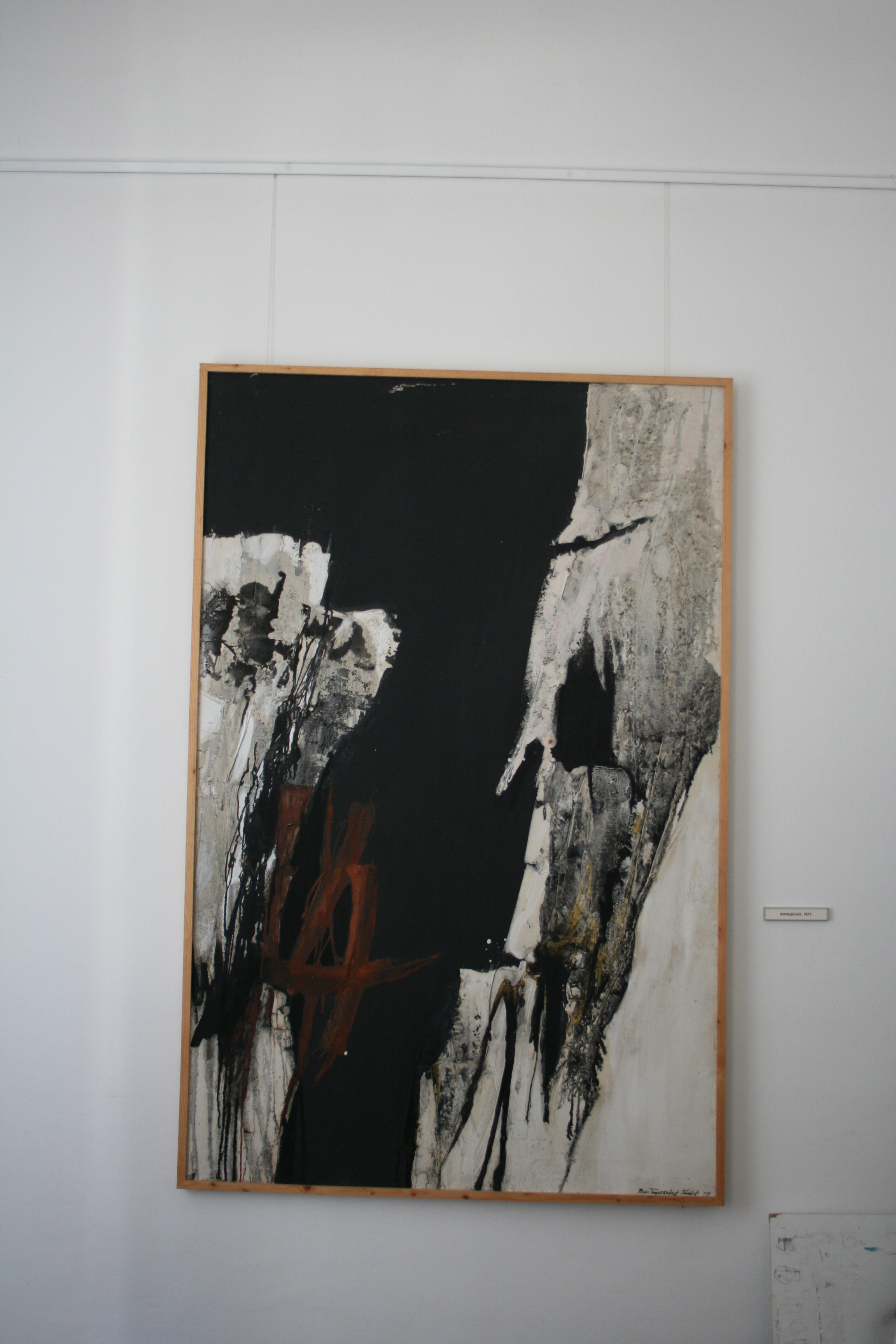 Galerija Miće Popovića, Loznica